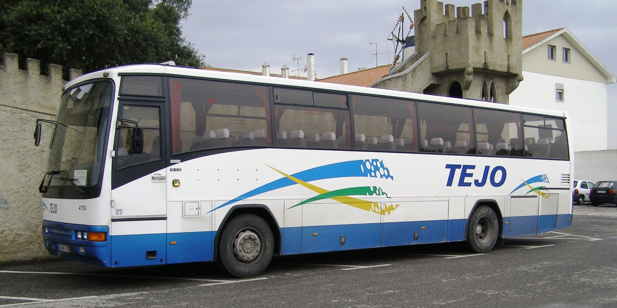 MAN AG bus, model 18-310, belonging to bus company Rodoviária do Tejo, at Sobreiro, Mafra, Portugal.